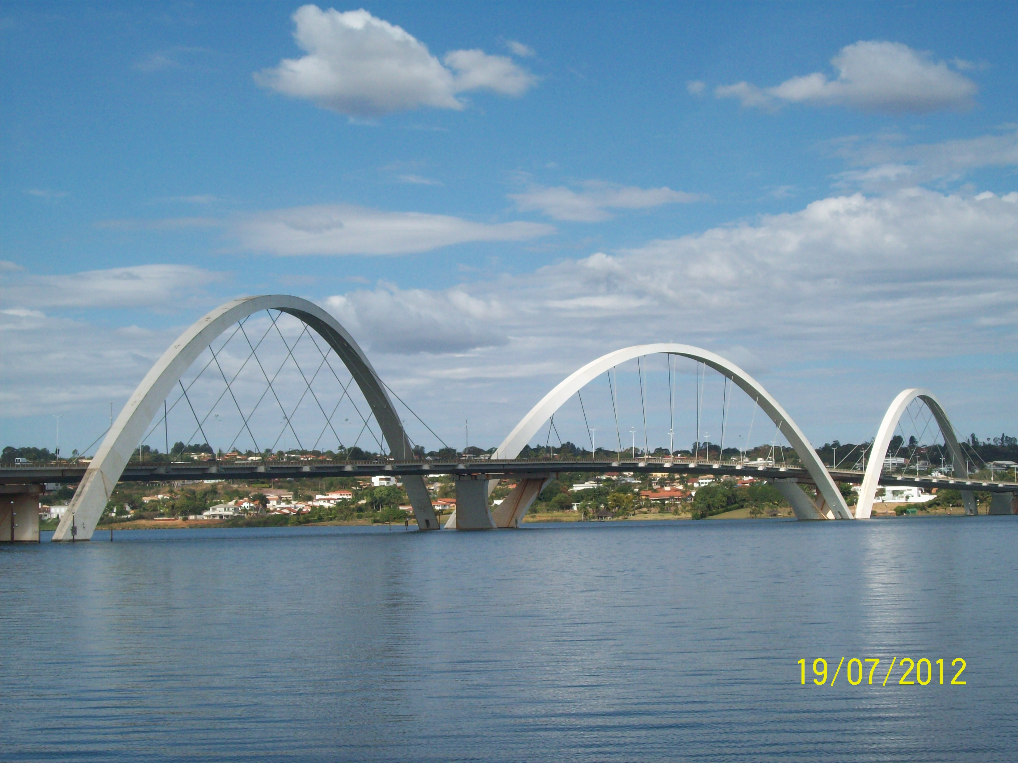 Brasilia DF Brasil - Ponte JK